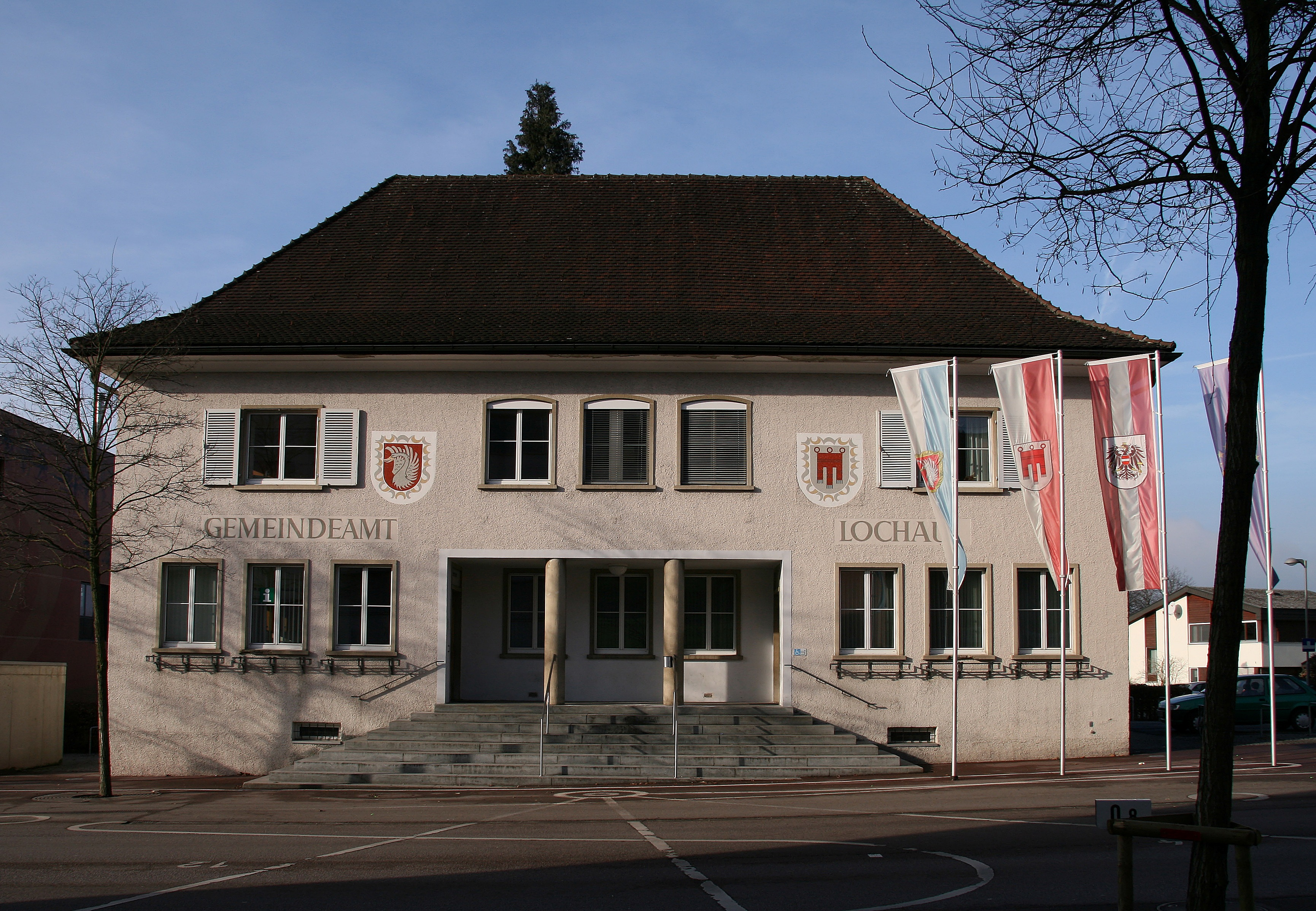 Altes Gemeindeamt von Lochau in Vorarlberg. Abbruch im Jahr 2016